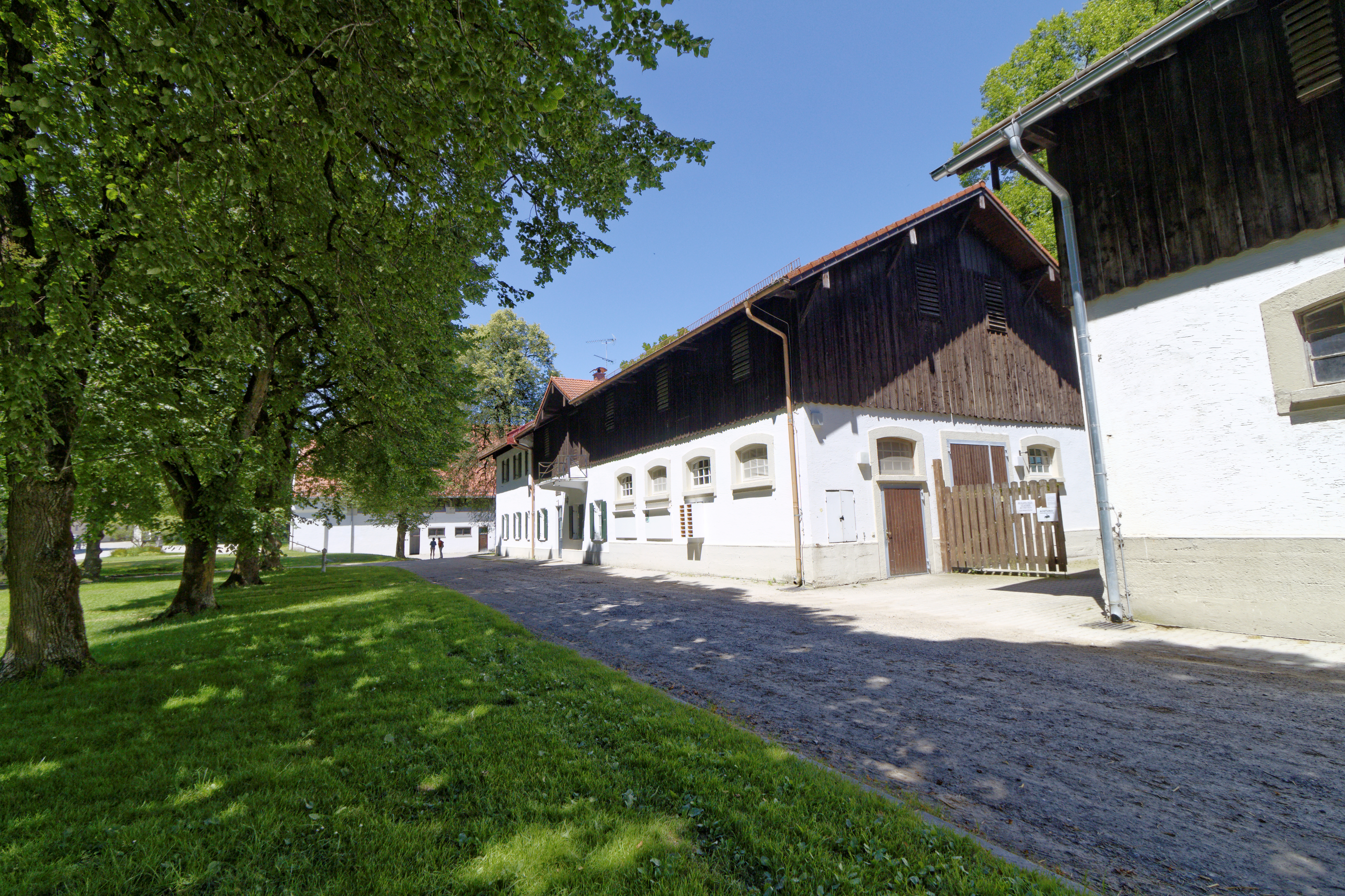 Ohlstadt, Haupt- und Landesgestüt Schwaiganger; Nr. 23This is a photograph of an architectural monument.